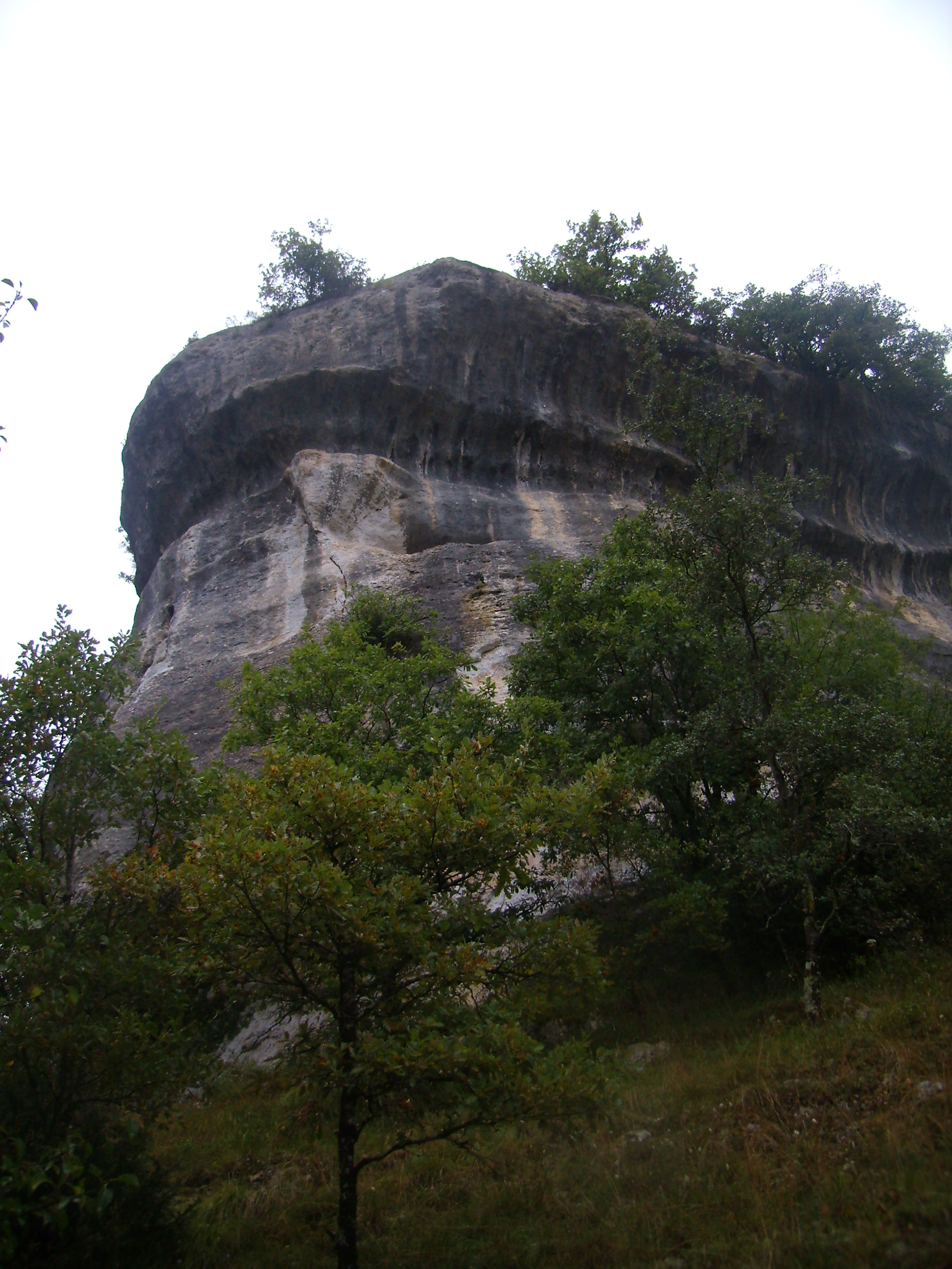 Falesia di Font de Gaume, Les Eyzies-de-Tayac-Sireuil, Dordogna, Francia Object location44° 56′ 12″ N, 1° 01′ 37″ E